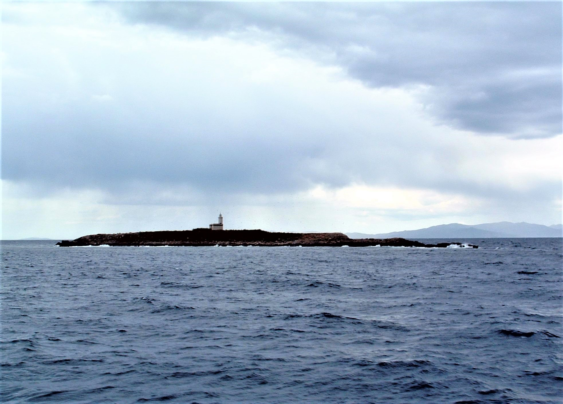 Formiche di Grosseto